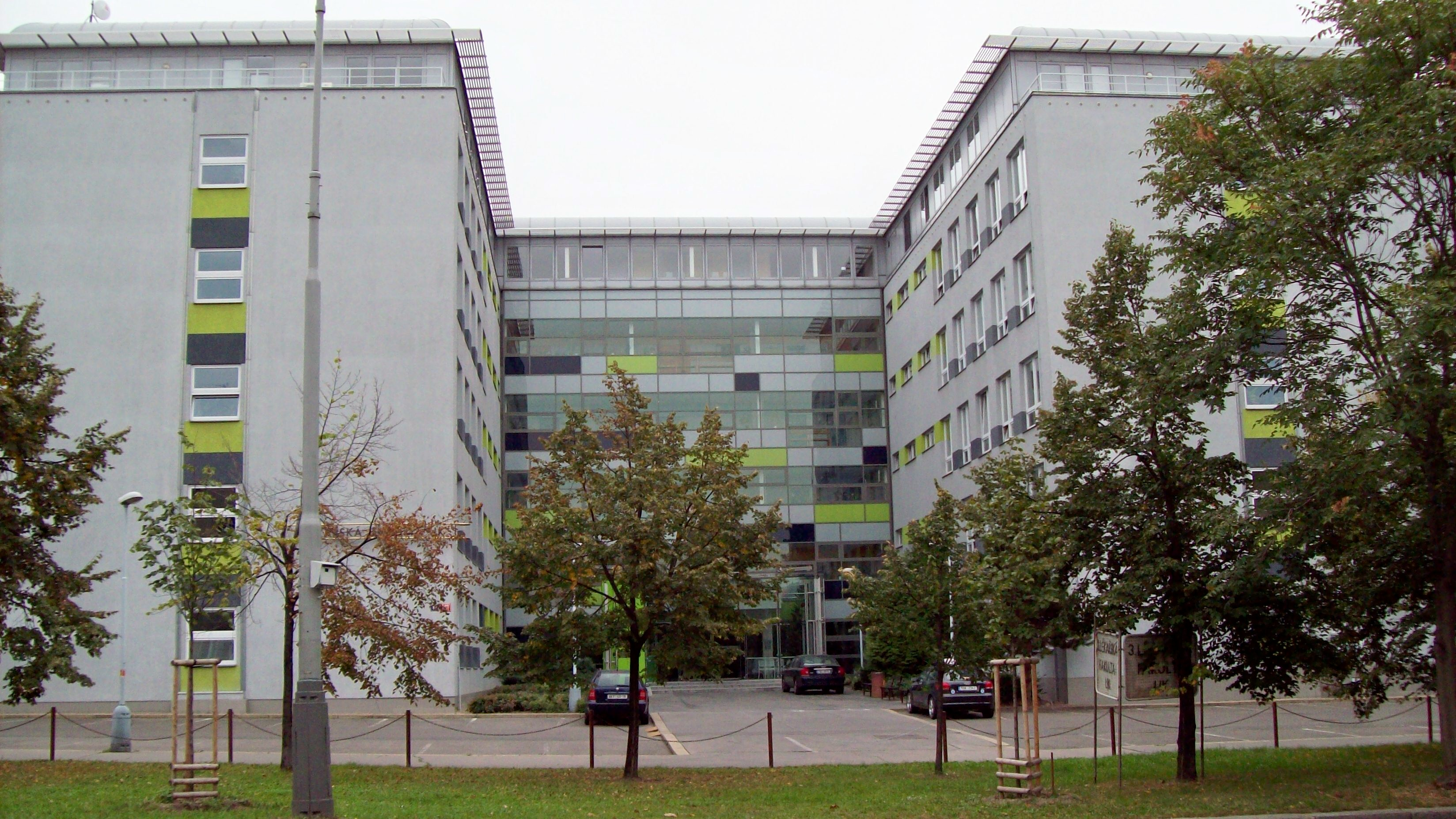 Budova 3. lékařské fakulty Univerzity Karlovy v Praze, ulice Ruská 87, Praha 10. Směrem doleva: průchod do Státního zdravotního ústavu, směrem doprava: průchod do areálu Fakultní nemocnice Královské Vinohrady.